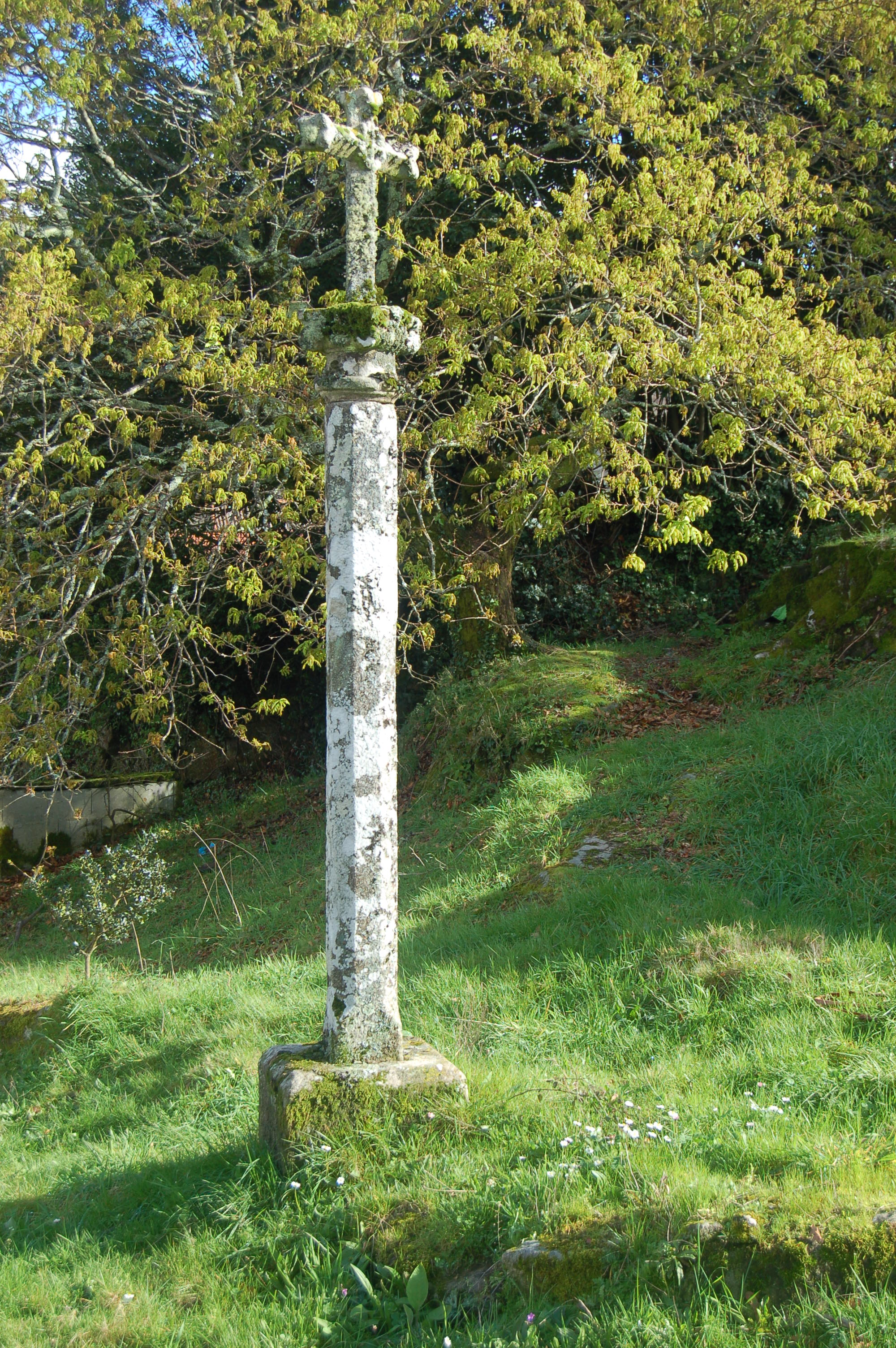 Cruceiro en Vila de Arriba (Sacos, Cerdedo-Cotobade)